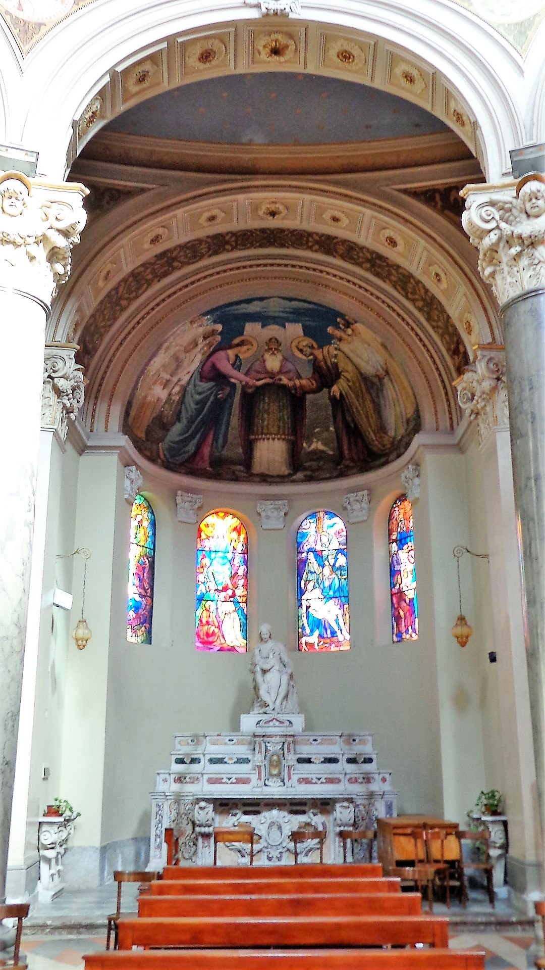 Altare minore / nord - occidentale.